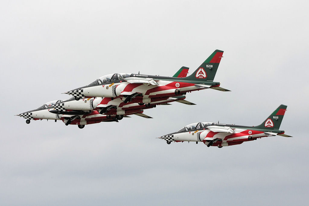 Asas de Portugal - RIAT 2008